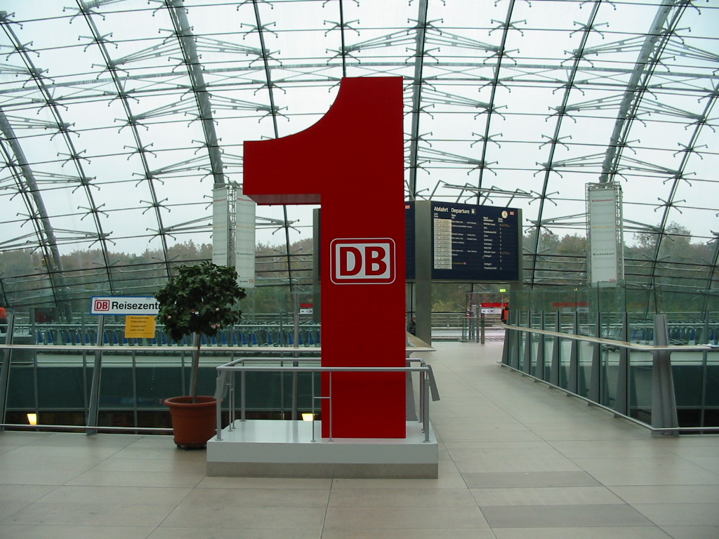 Rote Eins - Die Bahn schenkt Ihnen eine Stunde